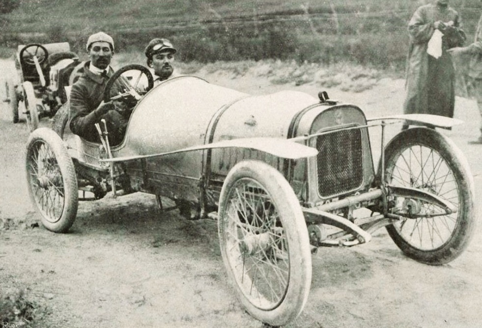 Jules Goux vainqueur de la Coupe des Voiturettes de Palerme (Corsa Vetturette Madonie) en 1909 sur Peugeot - La Vie au Grand Air du 15 mai 1909, p.311